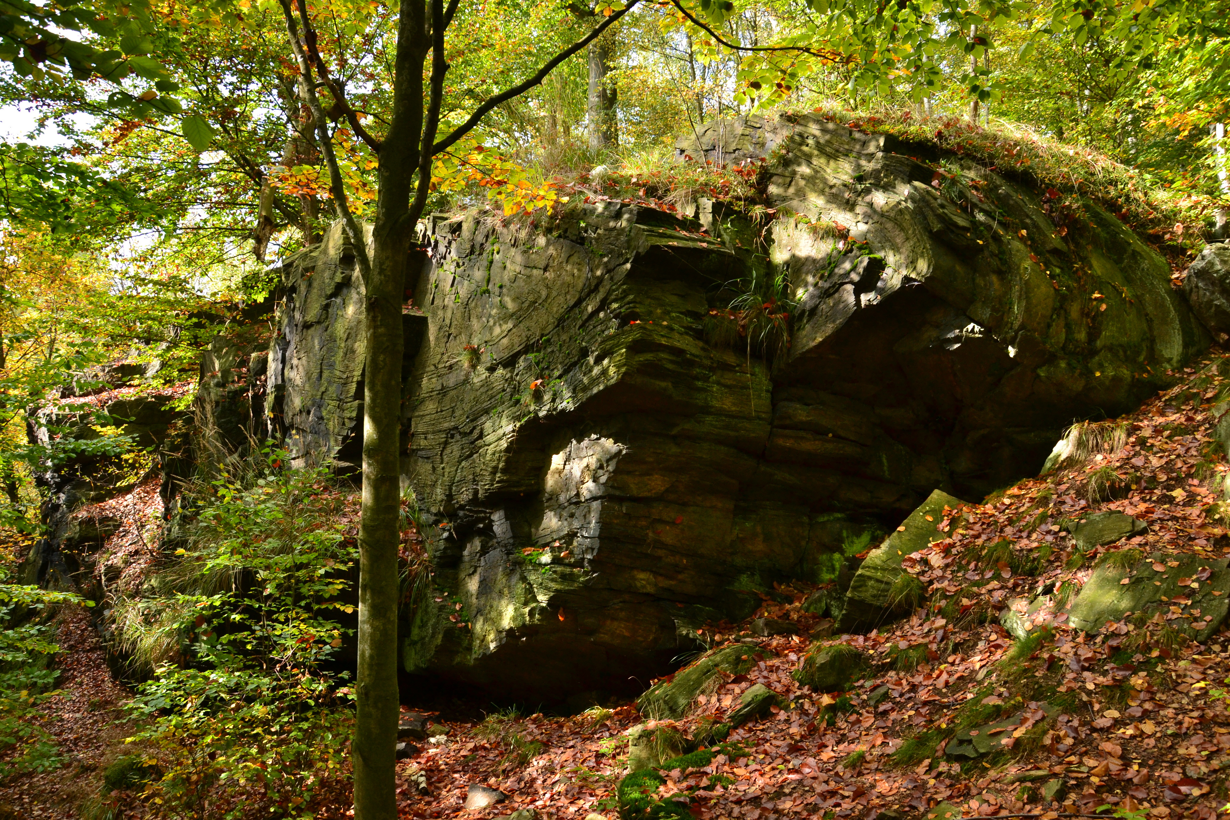 Přírodní památka Vrása